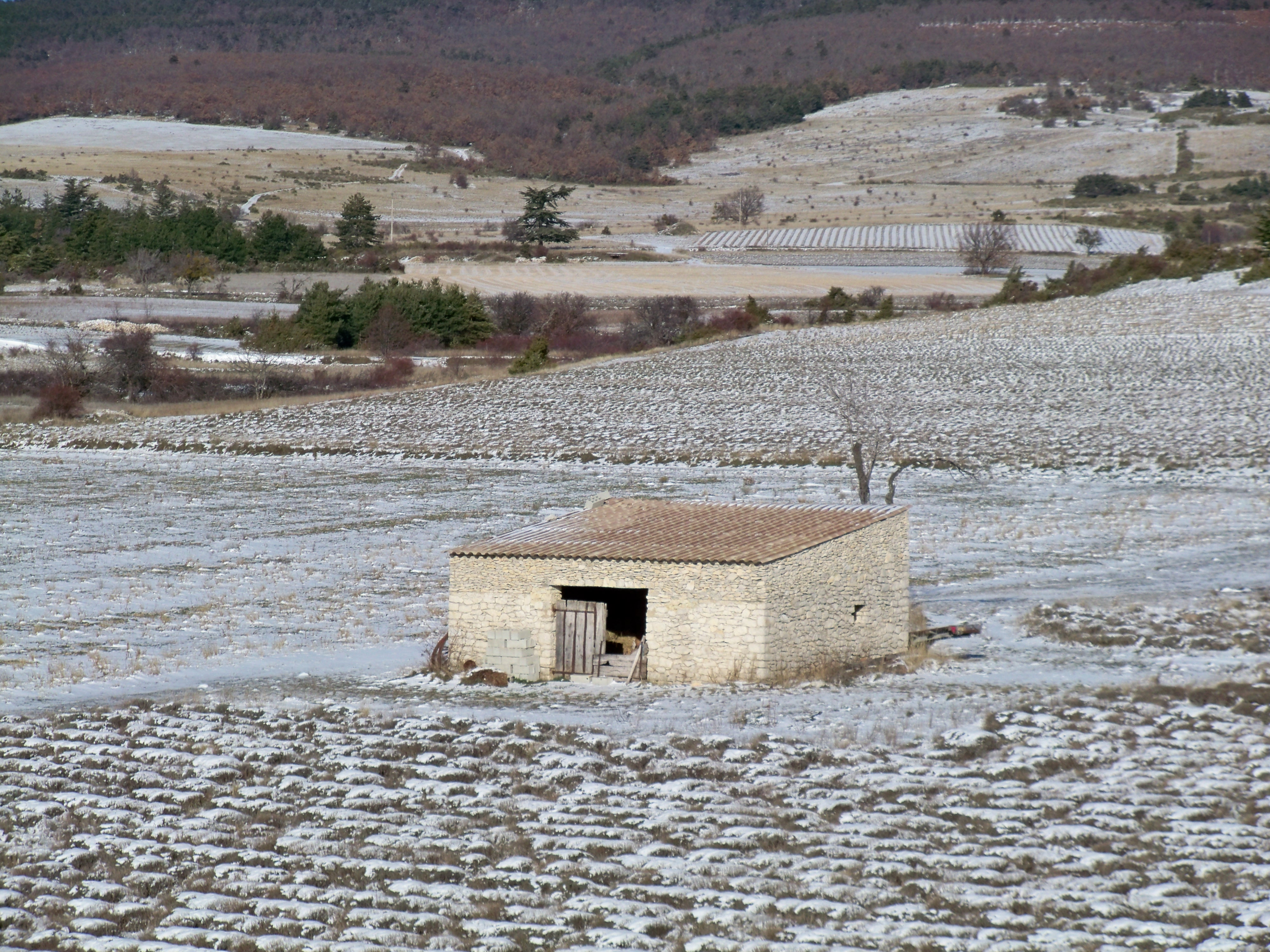 Cabanon près de Sault (Vaucluse)